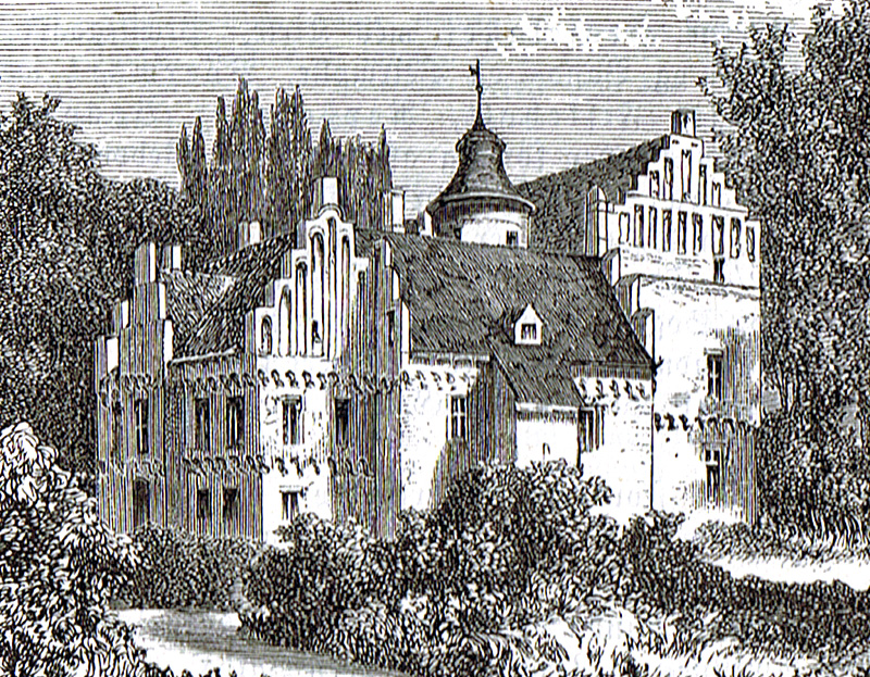 Rygård er blandt andet en herregård i Langå Sogn ved Ørbæk på Østfyn. Herregården nævnes første gang i 1372.